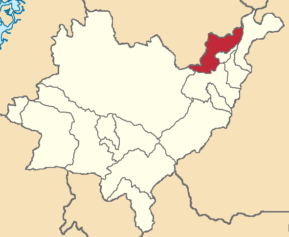 Mapa localizacor del cantón en Azuay, Ecuador